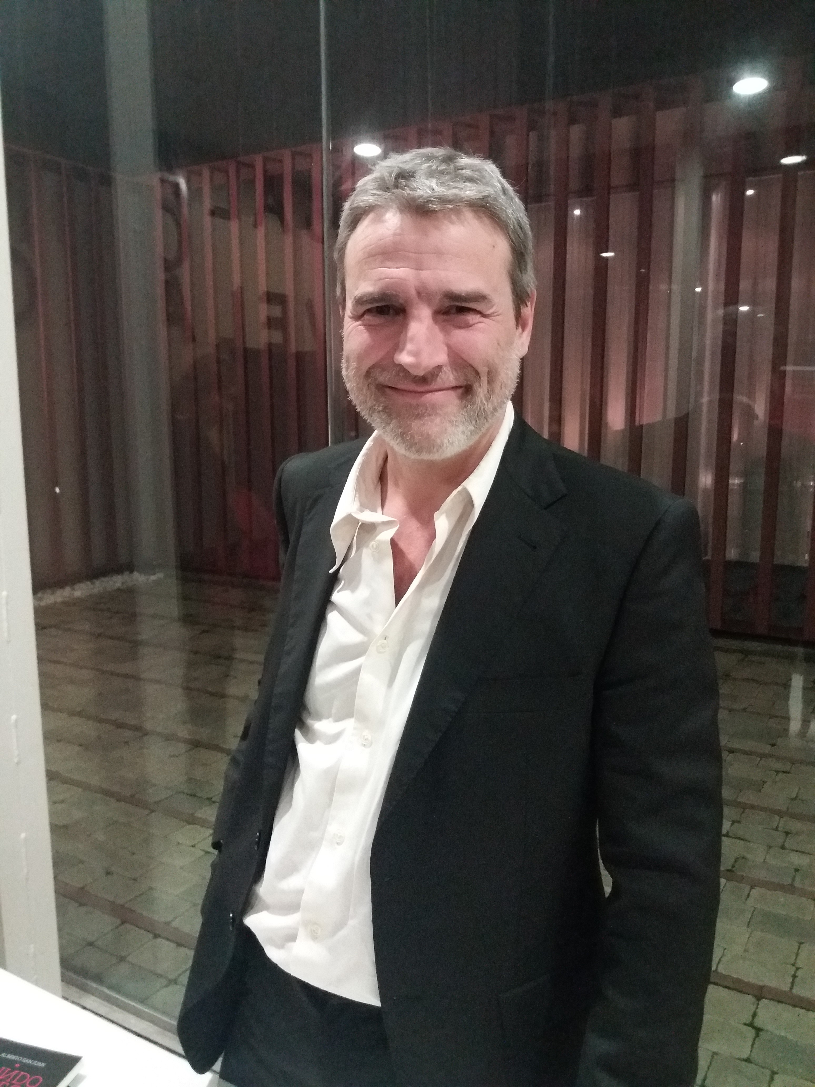 El actor y director español Alberto San Juan tras la representación de "Mundo Obrero" en la Sala Concha Velasco del LAVA en Valladolid (2018).